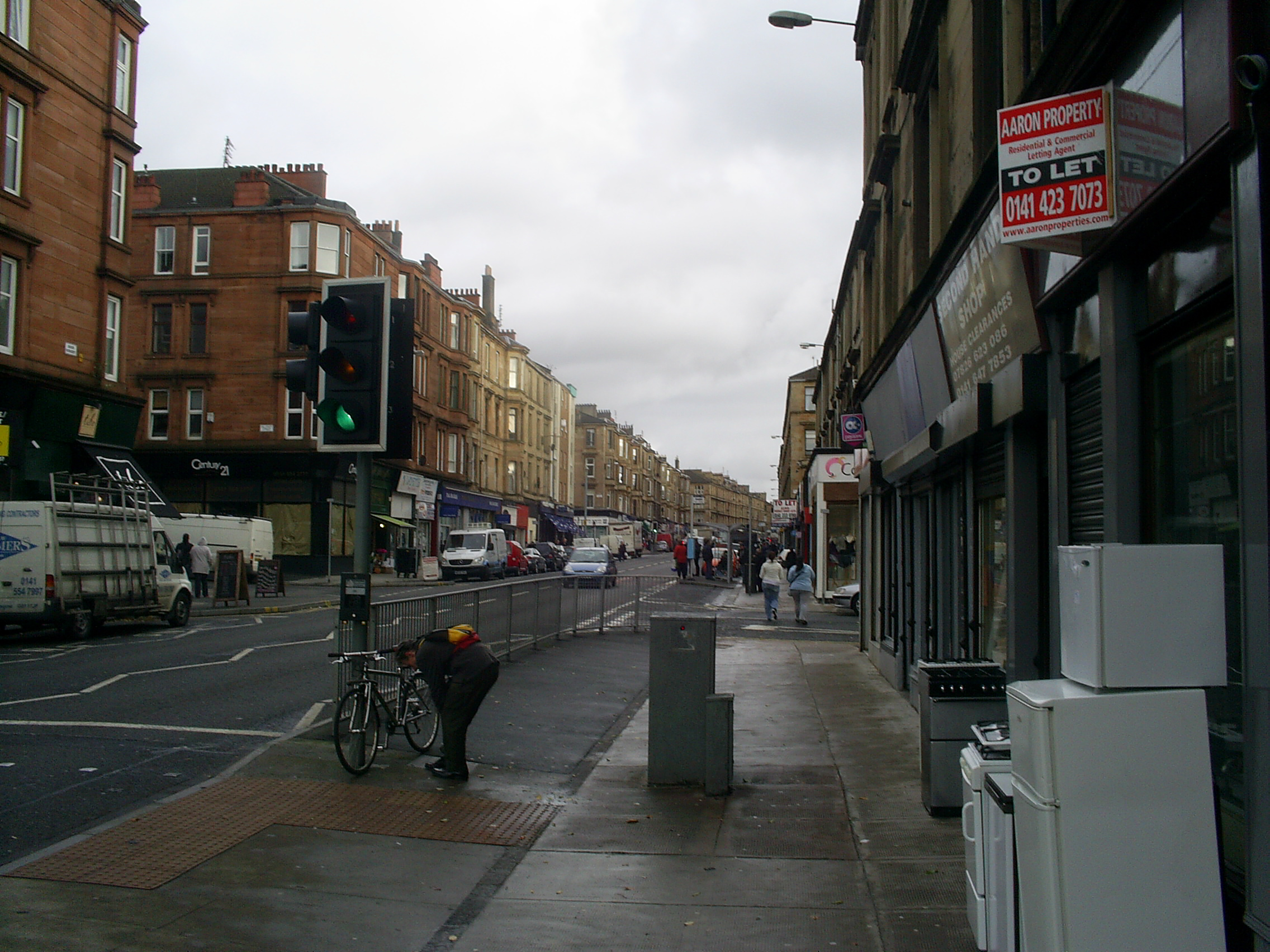 Duke Street